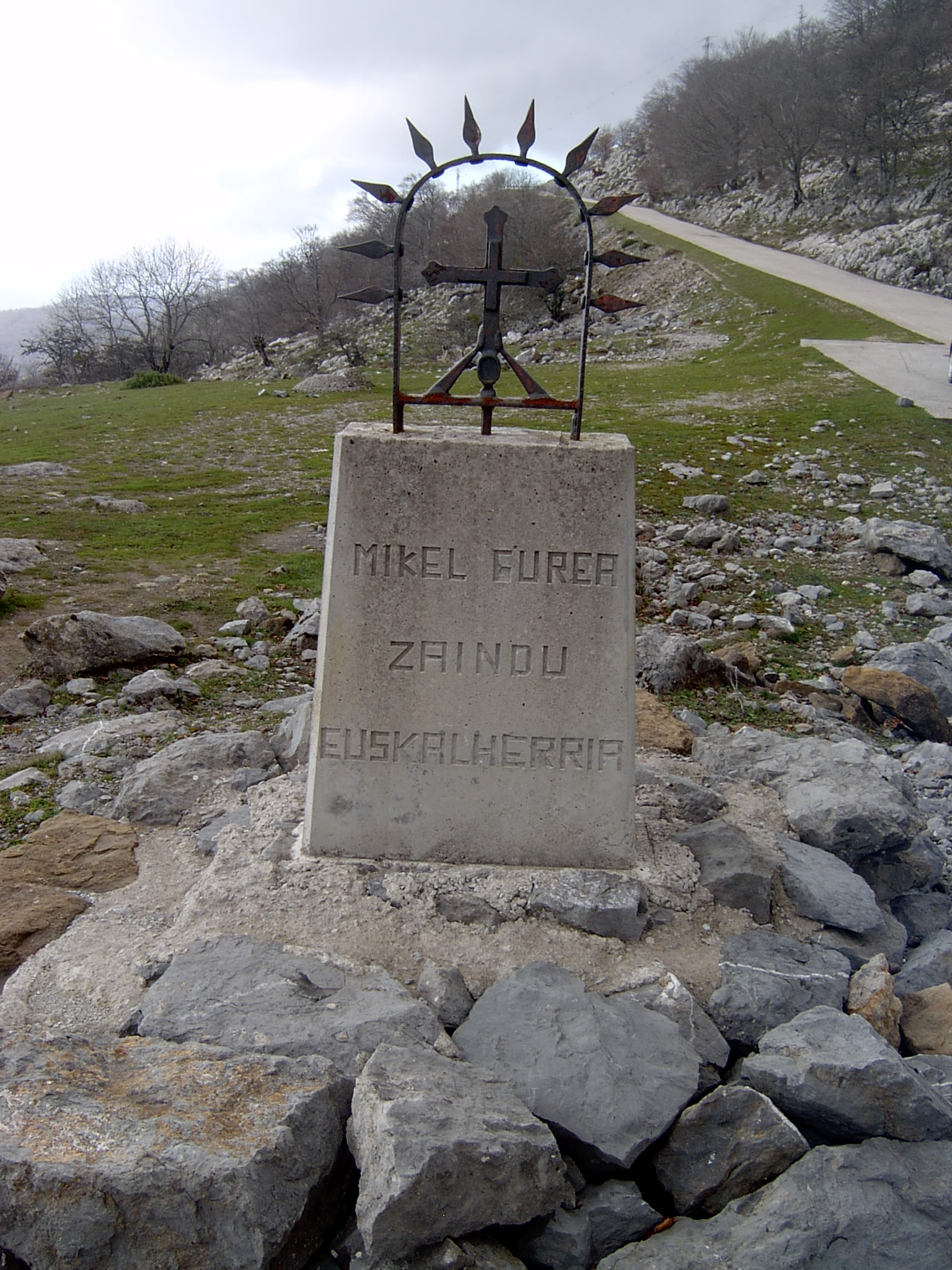 "Mikel Gurea Zaindu Euskalerria". San Migel Aralarko igoera bidean dagoen harria. Uharte-Arakil. Nafarroa, Euskal Herria.